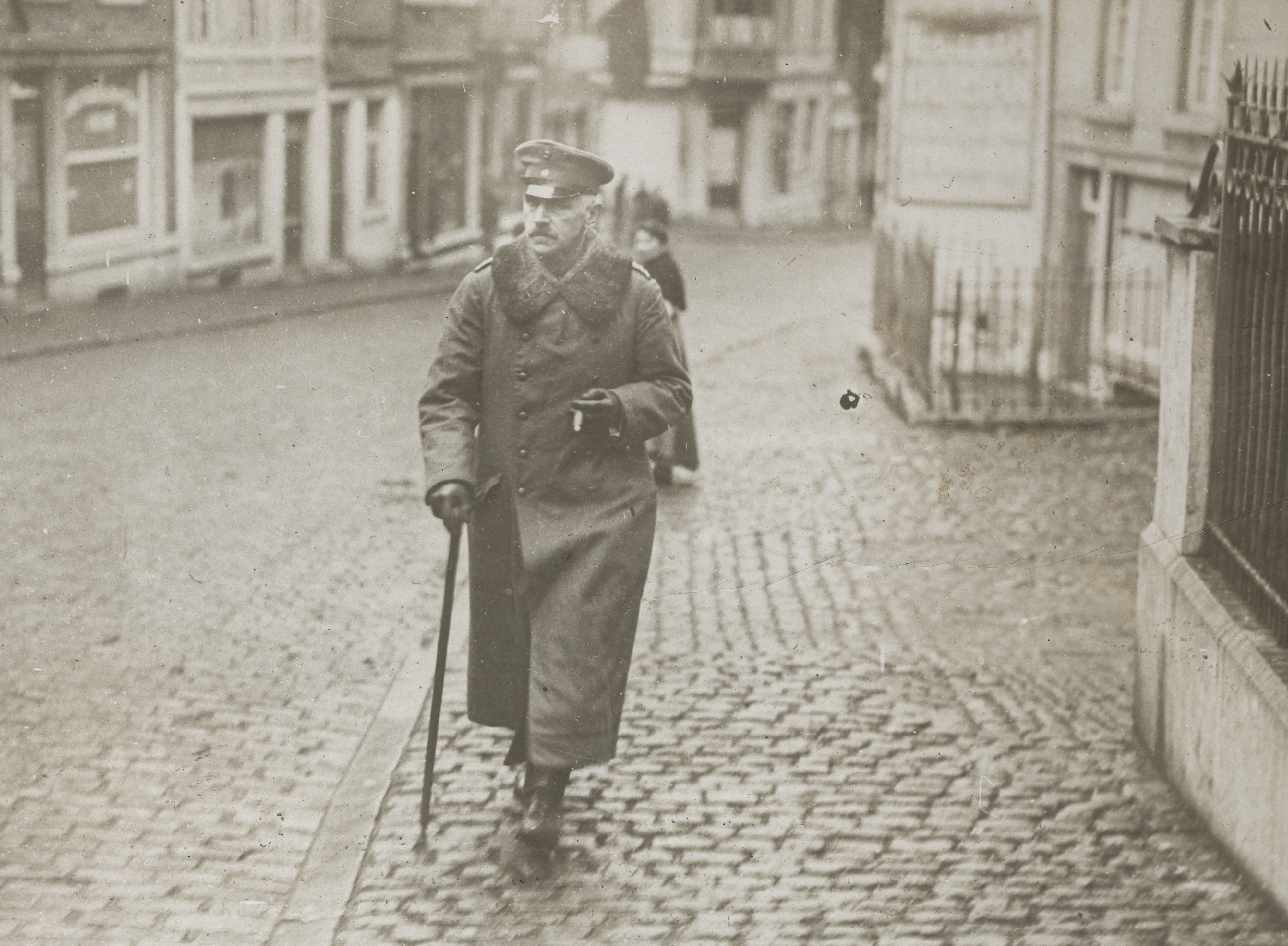 à Spa_la_comission_d'Armistice avec le général von_Winterfeld pour les allemands.